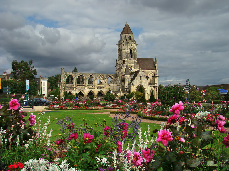 église Saint-Étienne-le-Vieux, Caen, Calvados, Basse-Normandie, France.